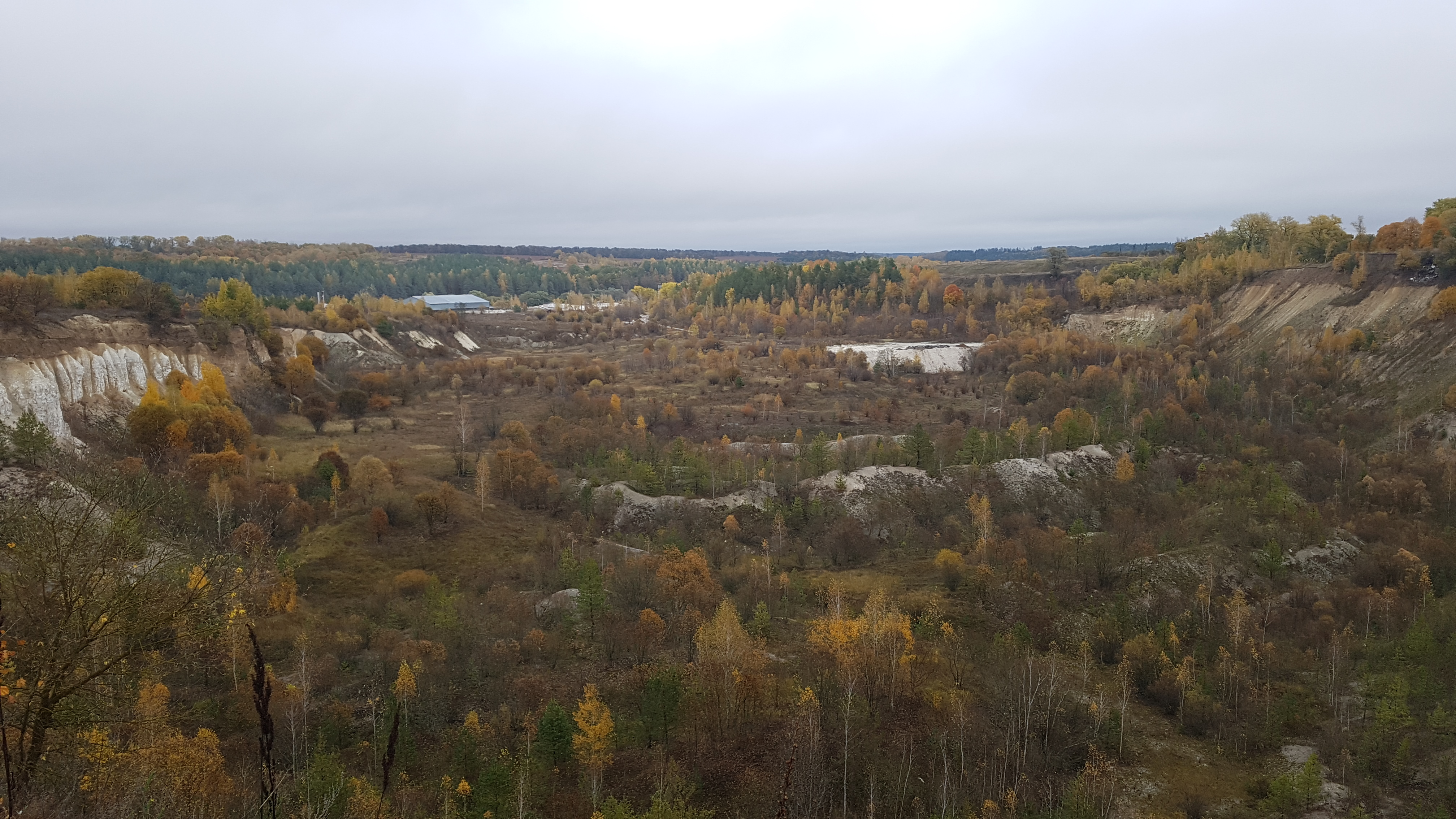 Крейдяні гори - Будівельне (15.10.2017)